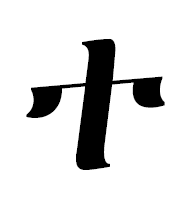 тави геэз